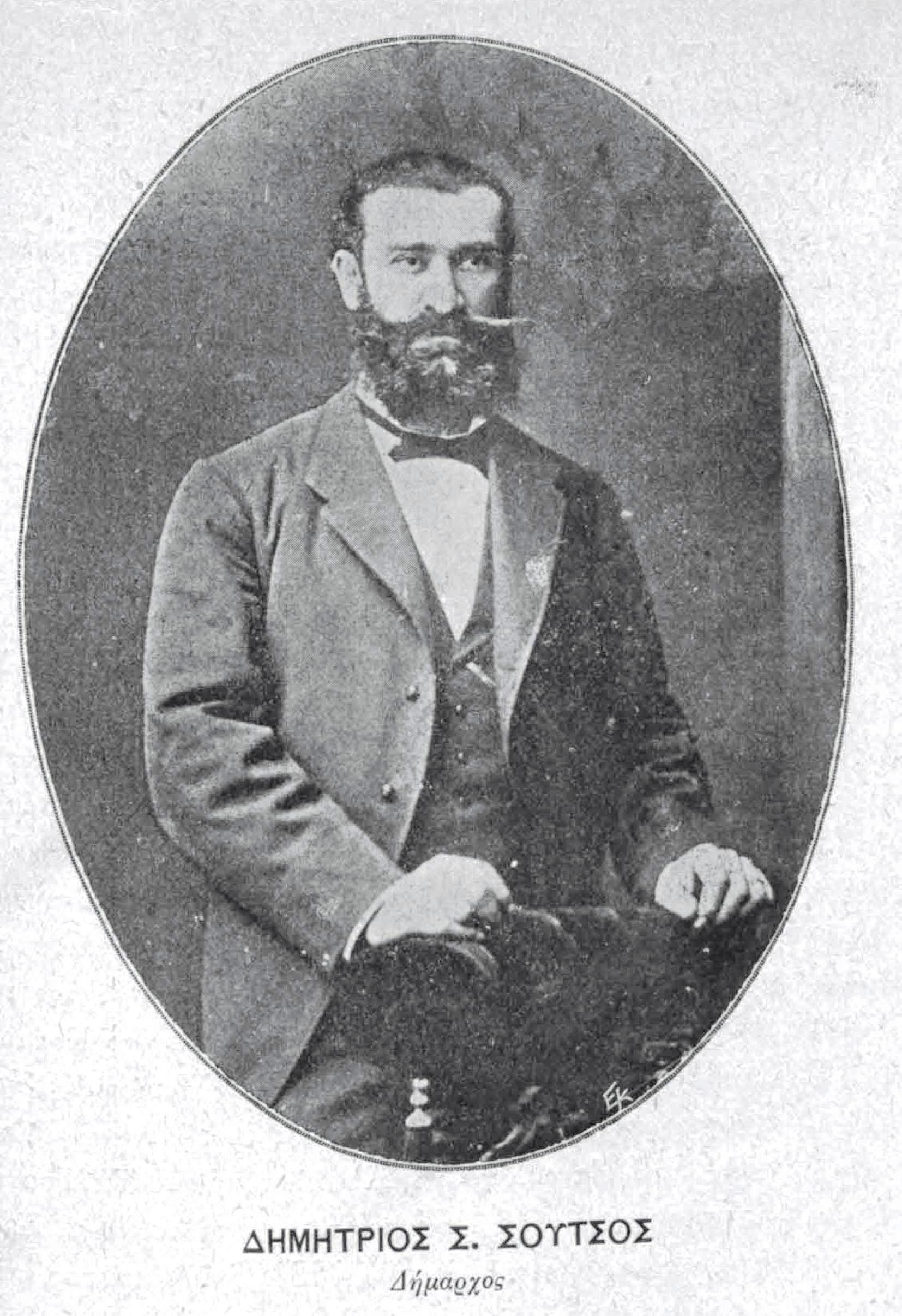 griechischer Bänker, 19.-20. Jahrhundert